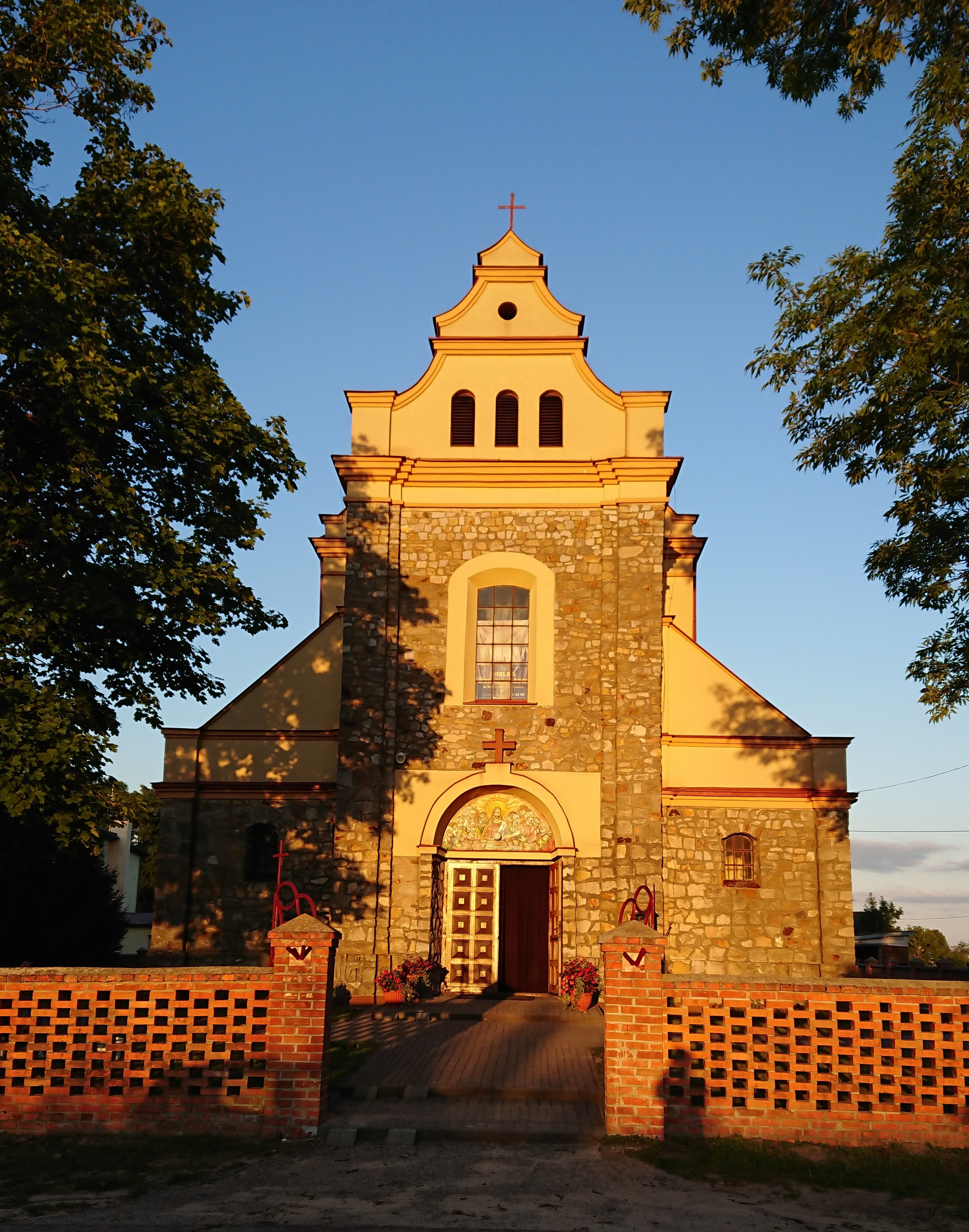 Kościół (parafia św. Izydora, Wola Wereszczyńska 1, 22-234 Urszulin). Kościół istniał już w 1740 r. Następny wybudowany w 1840 r., który się spalił. Inny kościół drewniany, zbudowany w 1919 r. już jako cerkiew prawosławna na miejscu dawnego unickiego. Parafia utworzona w 1922 r. Obecny kościół parafialny murowany, wybudowany w latach 1956-1962, staraniem ks. Bolesława Krzywca. Styl neobarokowy. Księgi metrykalne od 1922 r. Kronika parafialna od 1992 r.